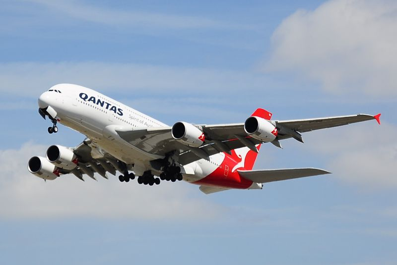 Airbus A380-842 - Qantas (VH-OQG)